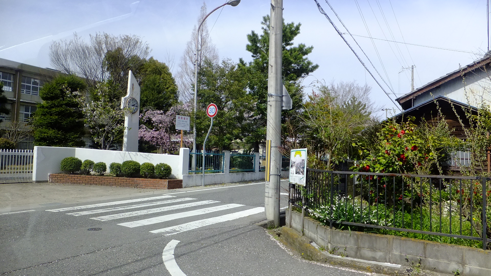 兵庫県三木市末広1丁目